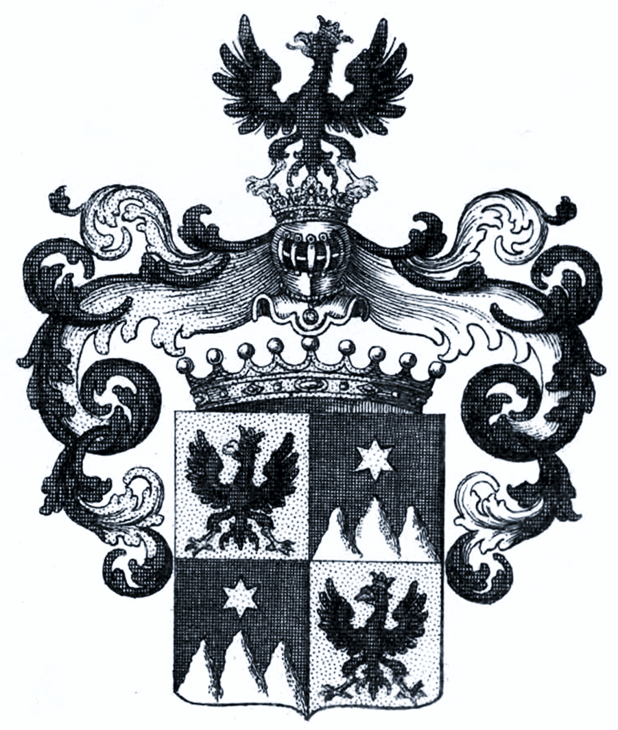 Wappen der Grafen von Pergen, 1608, 1699, 1710